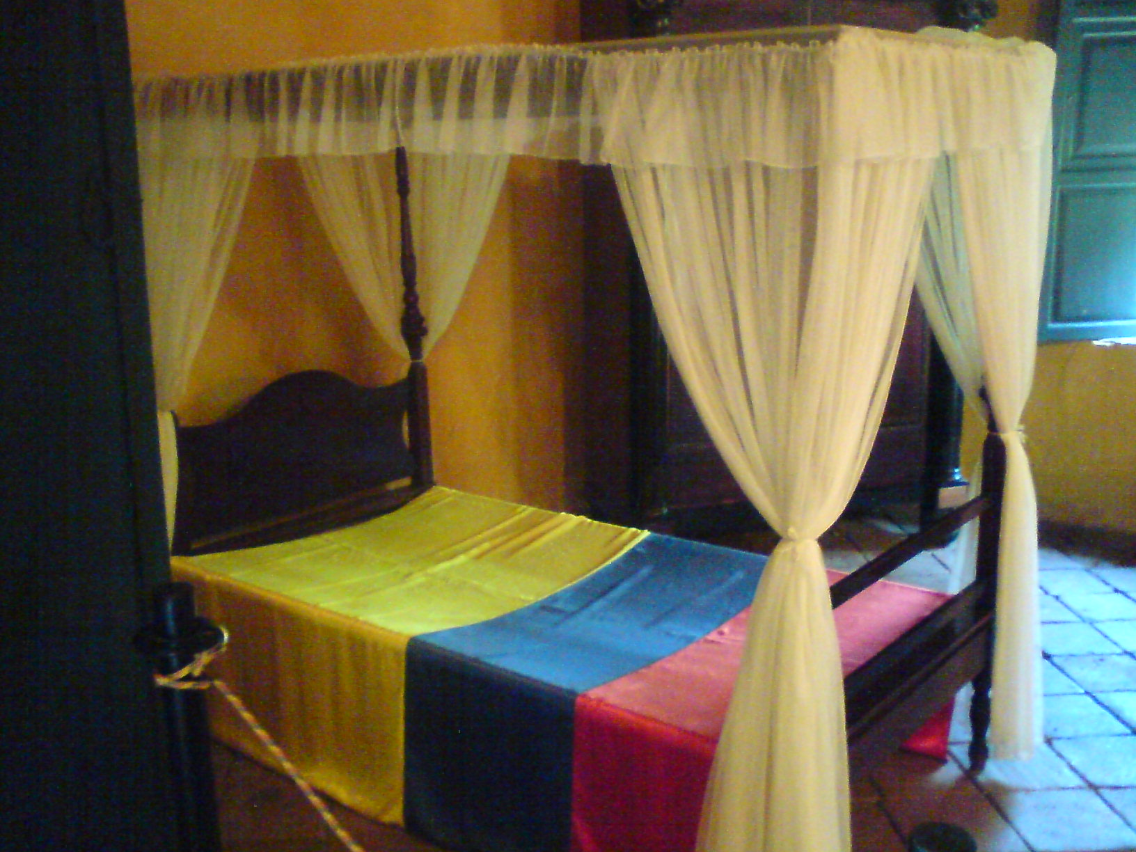 La quinta de San Pedro Alejandrino fue la ultima morada del libertador Simon Bolivar en Santa Marta antes de morir.